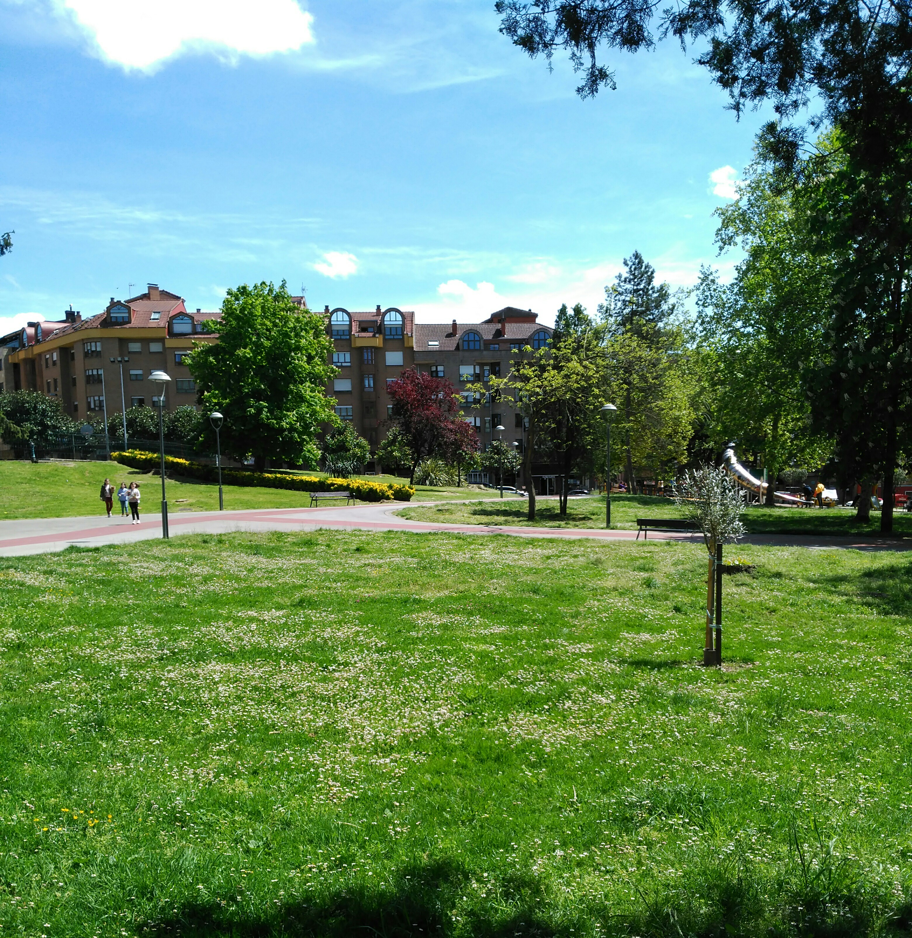 Zona del Parque Alcalde García Lago de La Felguera, Langreo, Asturias